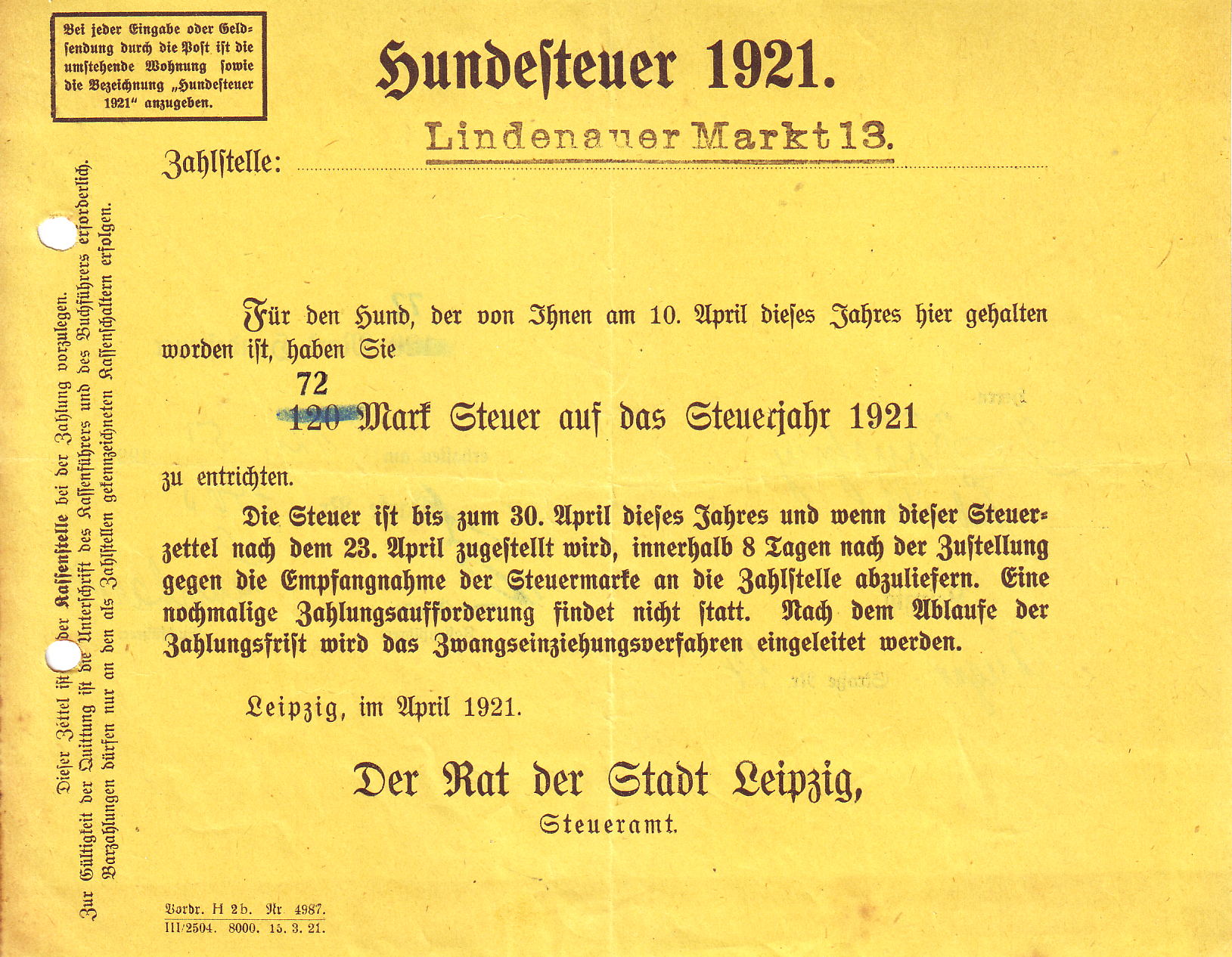 Hundesteuer 10. April 1921, Zahlstelle Lindenauer Markt 13, Der Rat der Stadt Leipzig. Rechnung vom 10. April 1921 (Rückseite), für Herrn J. Konetzny, Fabrikbesitzer, Rauchwarenfärberei & Zurichterei, Leipzig-Lindenau, Angerstraße 24. 72 Mark Hundesteuer, quittiert am 12. Mai 1921